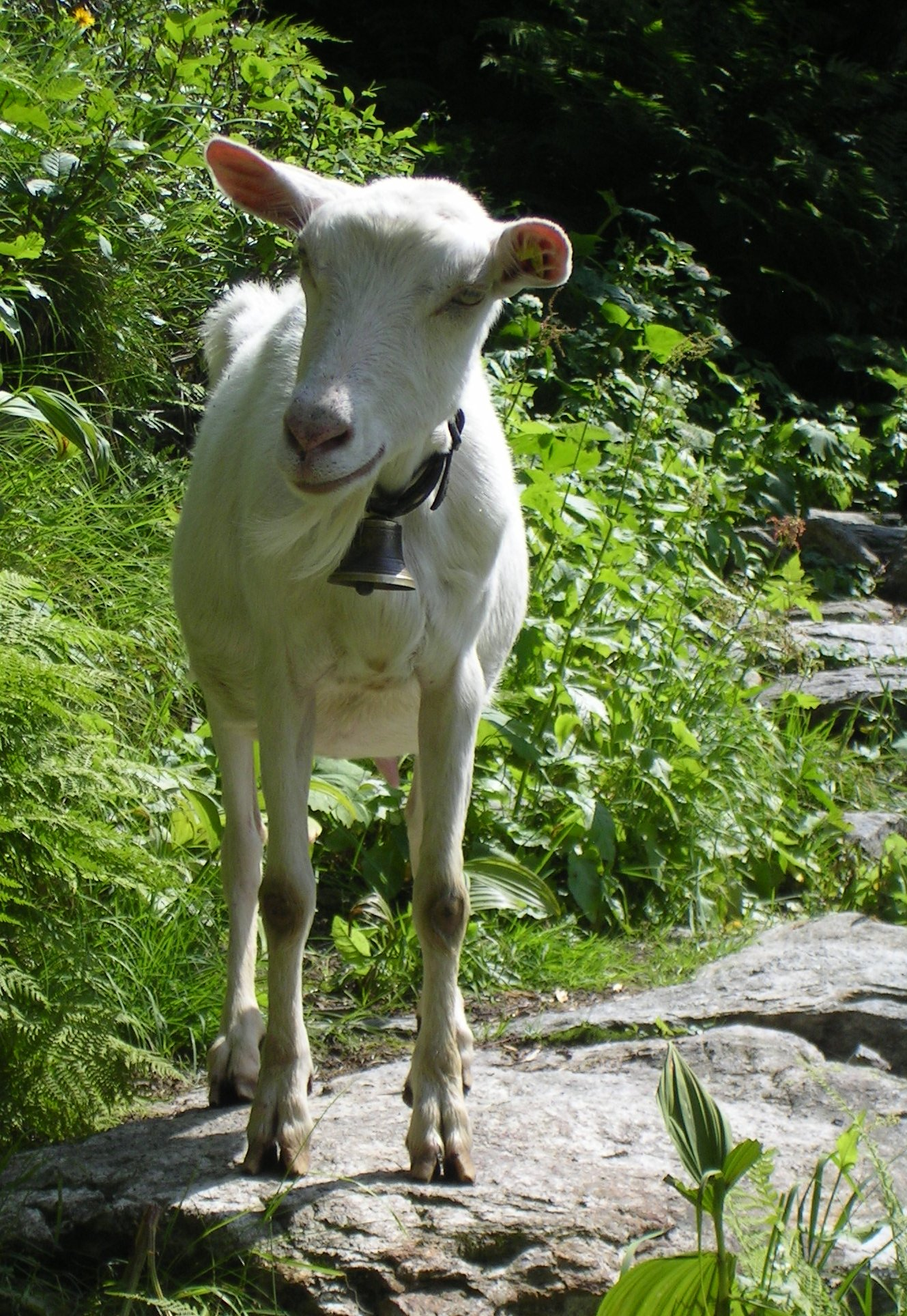 (de) Ziege auf dem Susten (alter Säumerweg), CH Bearbeitung: Etwas zugeschnitten.